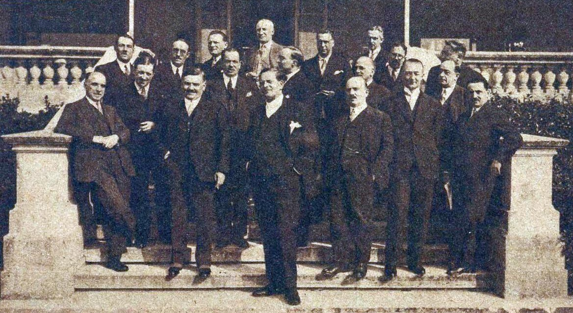 L'U.F.R.A. en 1931 (président Mr de Luze).